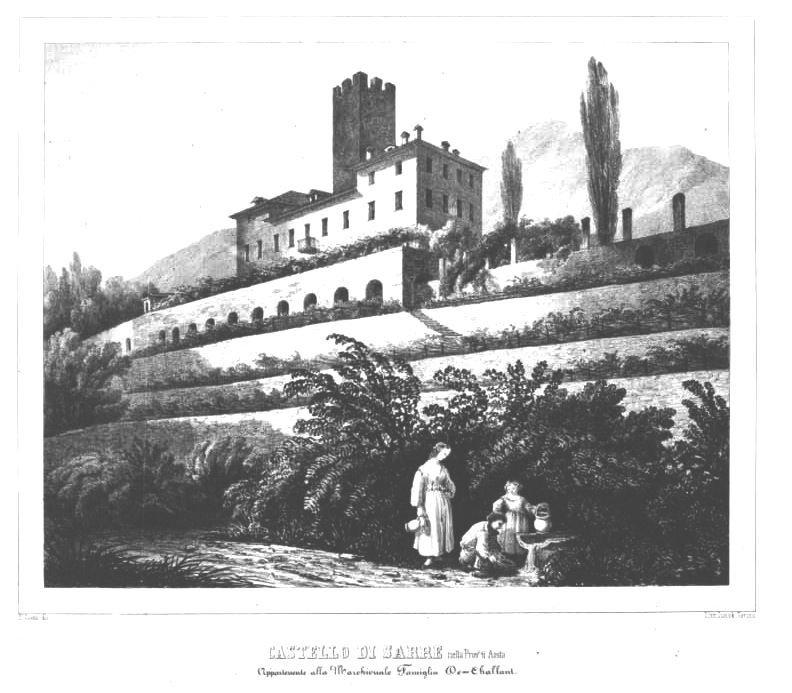 "Castello di Sarre nella Provincia di Aosta", litografia di J. Junck su disegno di E. Gonin della metà XIX secolo (archivio SBCVA)